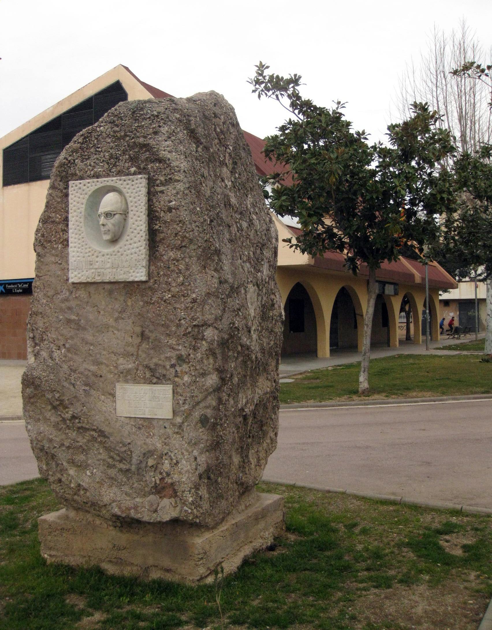 Parc municipal d'Olesa de Montserrat, monòlit a Daniel Blanxart Pedrals Object location41° 32′ 38.87″ N, 1° 53′ 25.56″ E